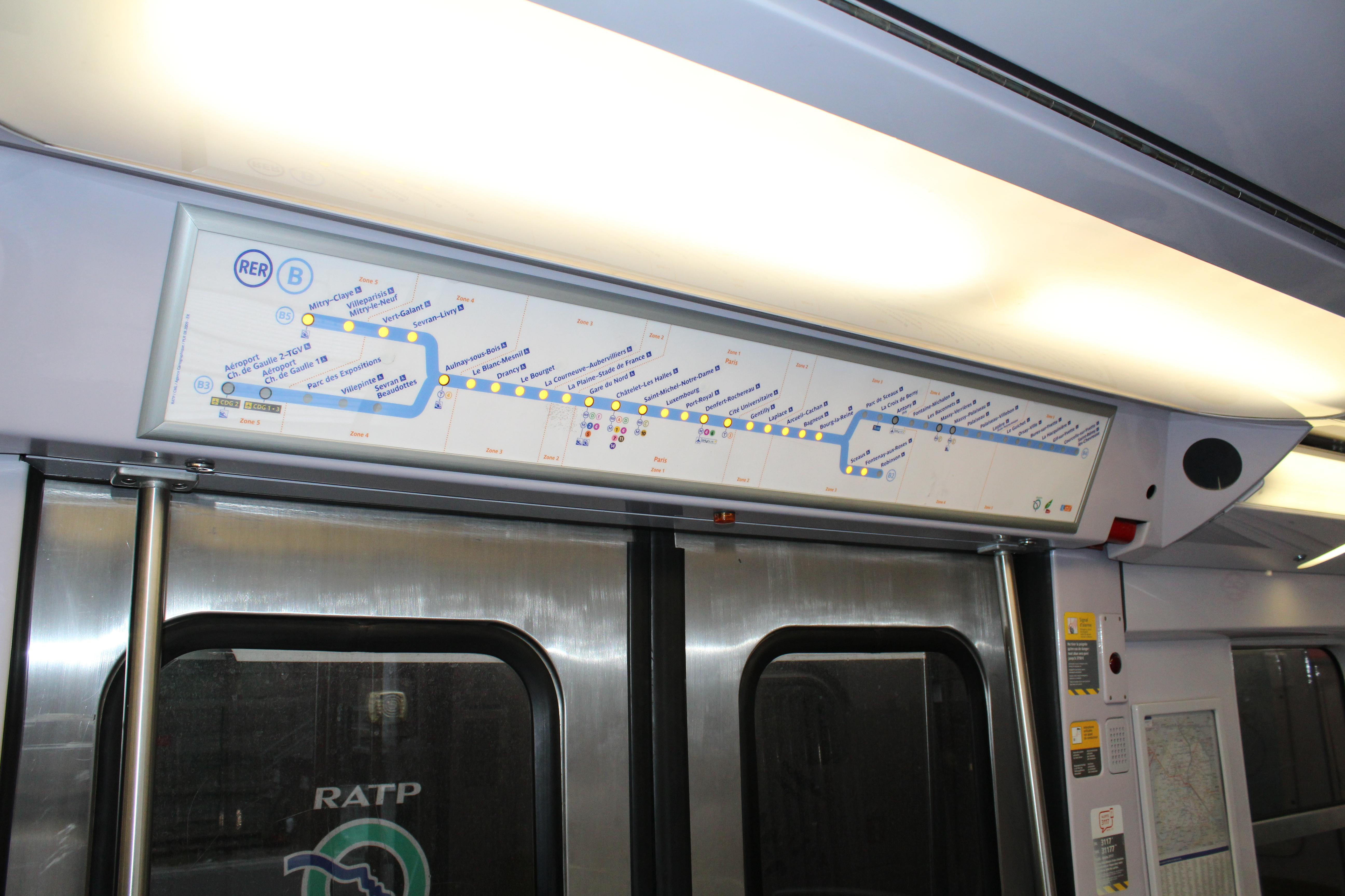 MI 79, Gare de Robinson, Sceaux.